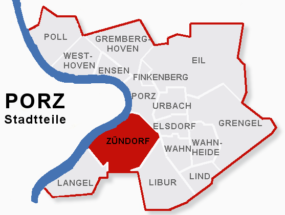 Lage des Stadtteils Zündorf im Stadtbezik Porz